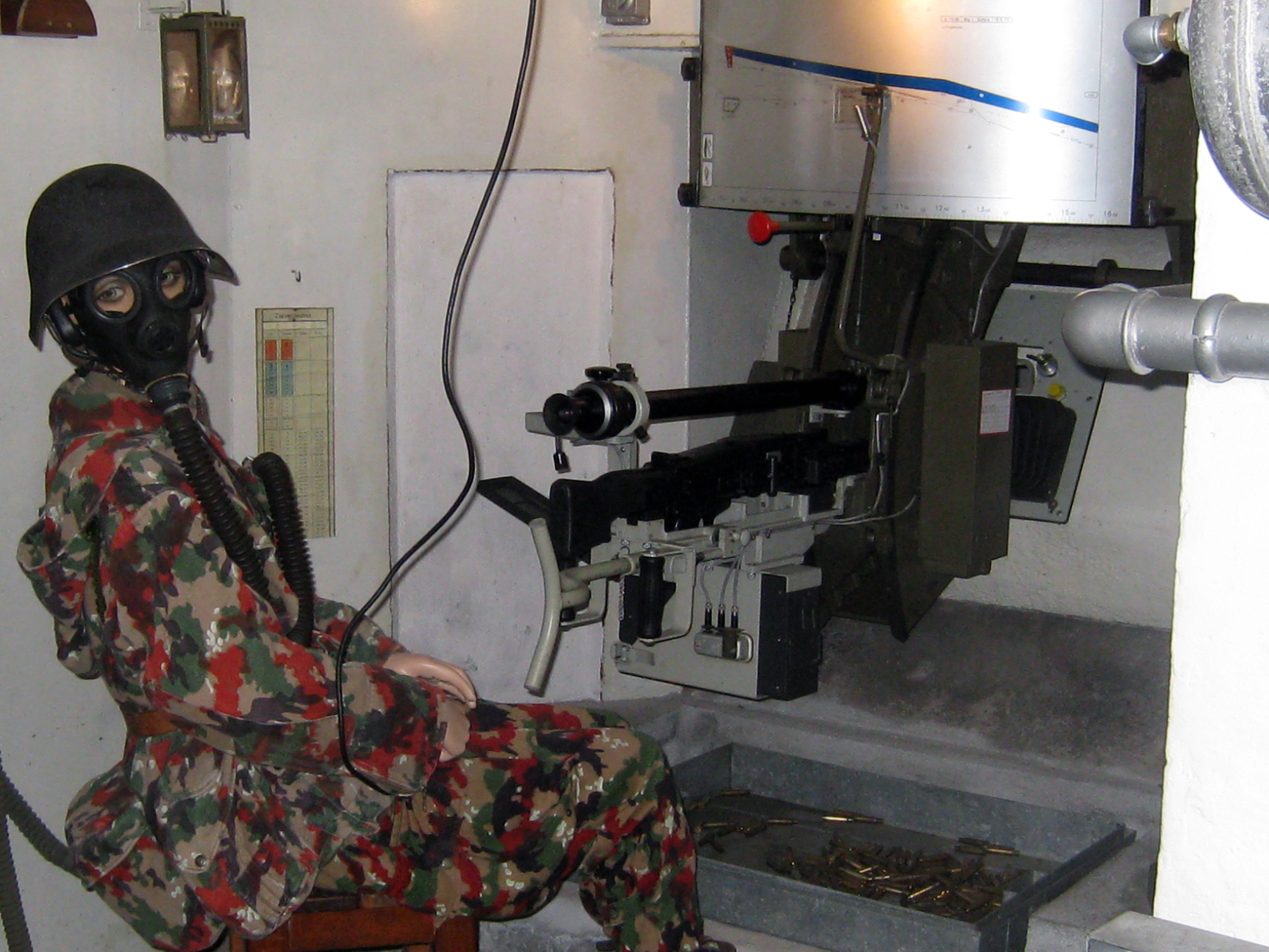 Infanteriewerk A 7838 in Sufers, Kanton Graubünden: Mg 51